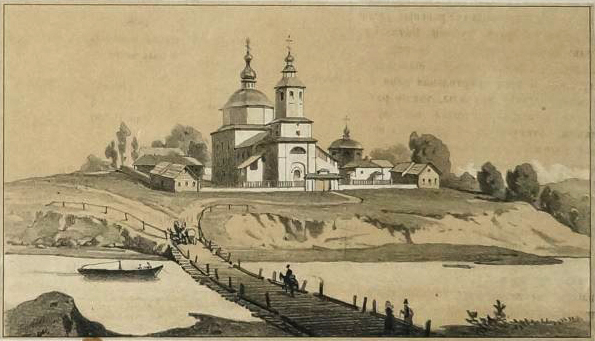 Беларуская (тарашкевіца): Парэчча (Parečča)